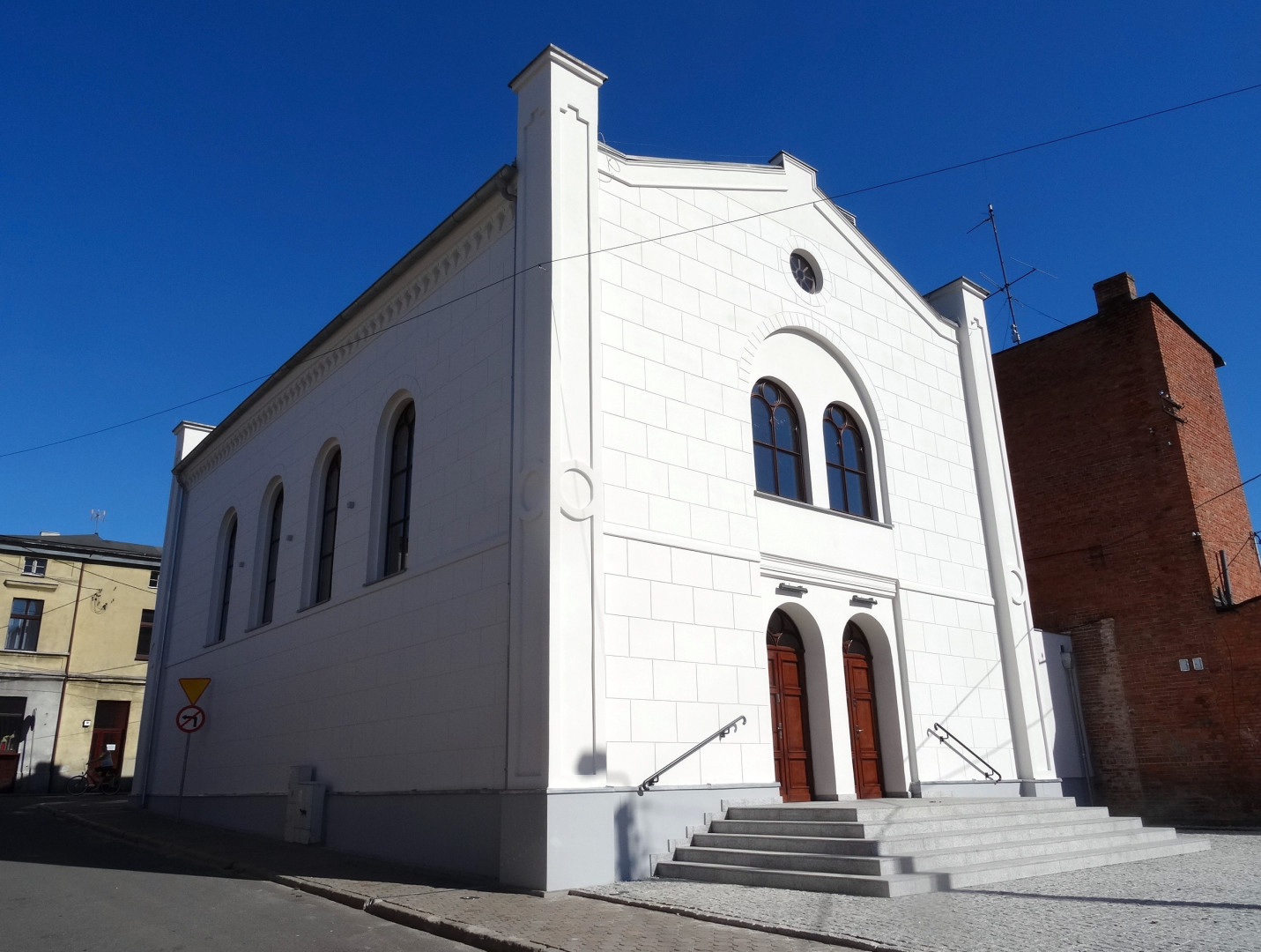 Synagoga w Koronowie